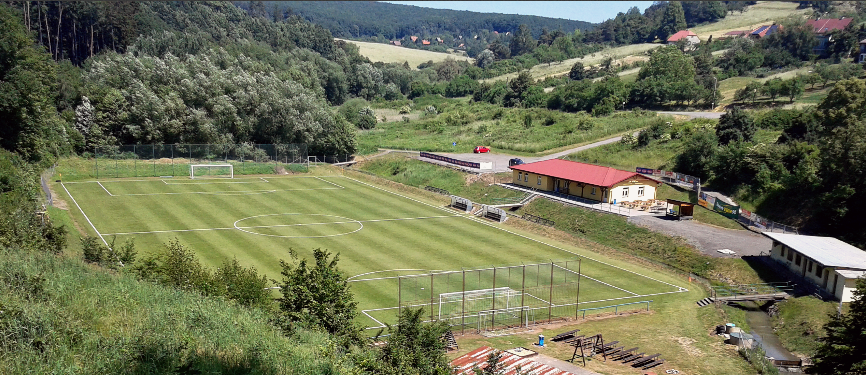 Hřiště TJ Osvětimany